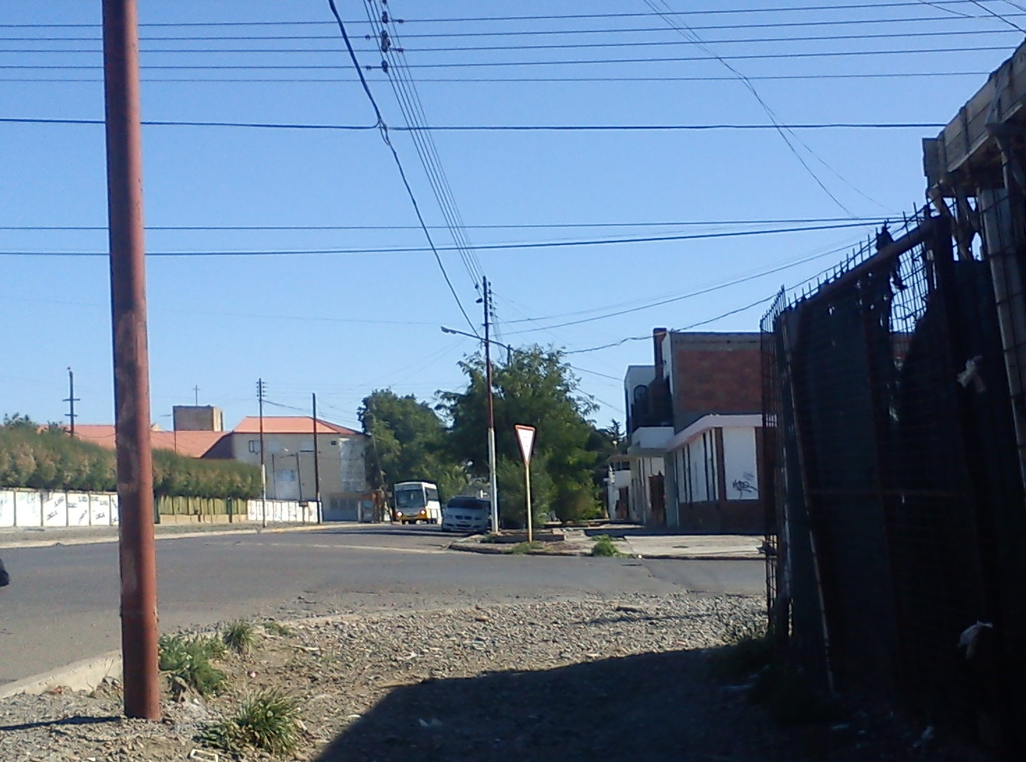 Foto mía, C2 en el centro